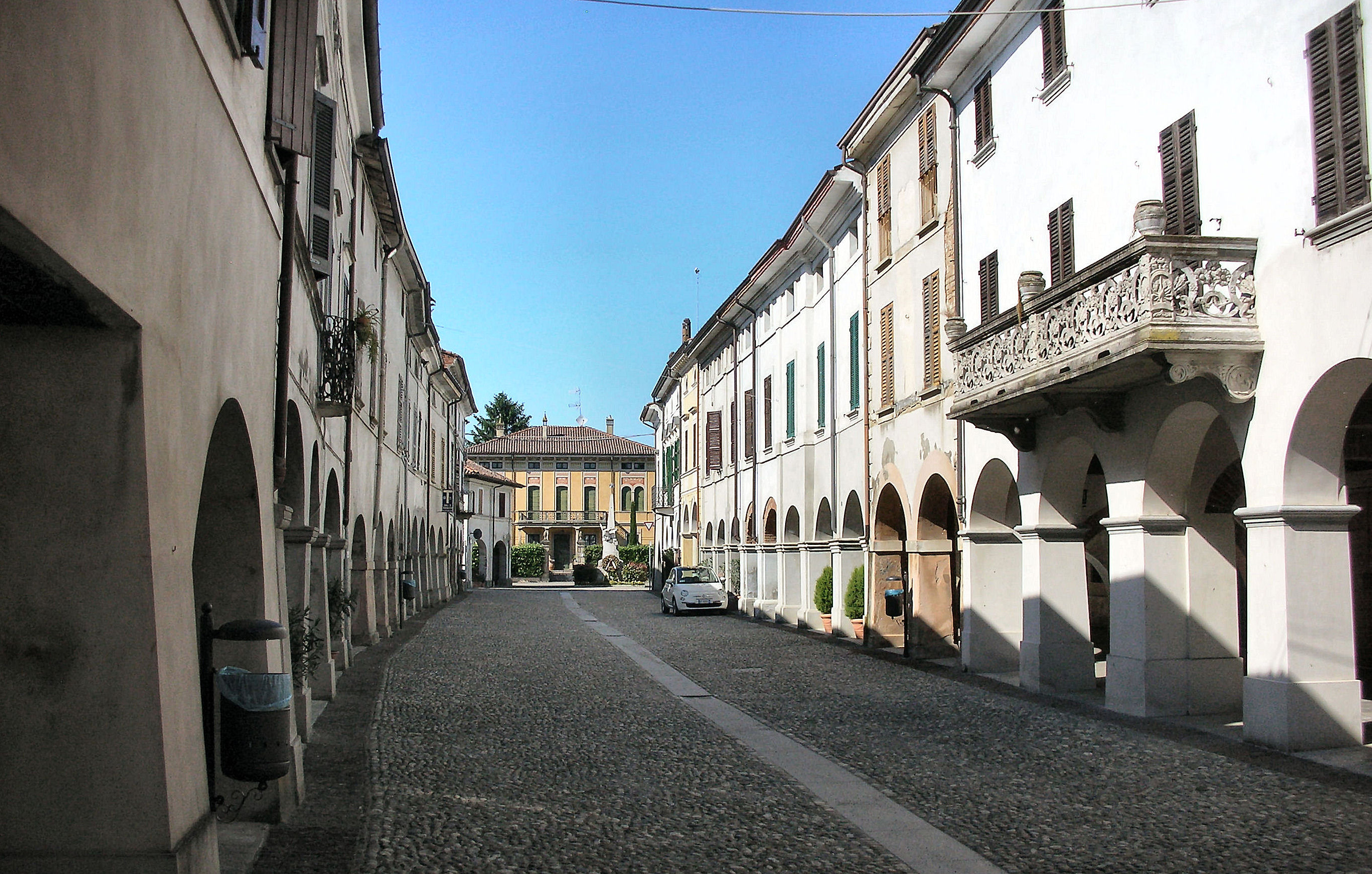 Via centrale - Castelponzone